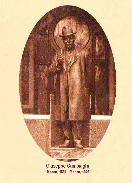 Giuseppe Cambiaghi (1851 - 1925) imprenditore monzese nel settore tessile del cappello